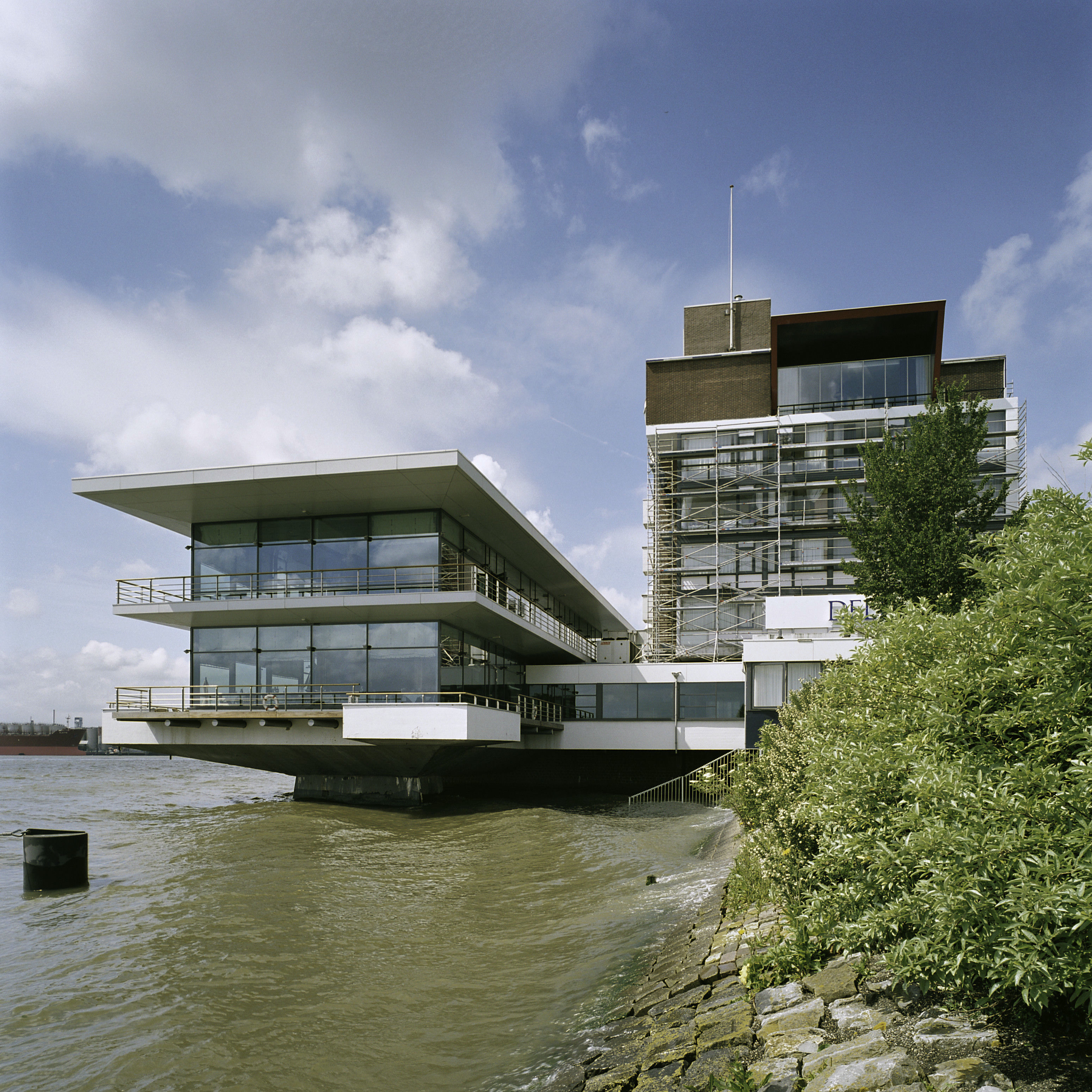 Delta Hotel: Overzicht met het gedeelte van het hotel wat boven de Nieuwe Waterweg is gebouwd